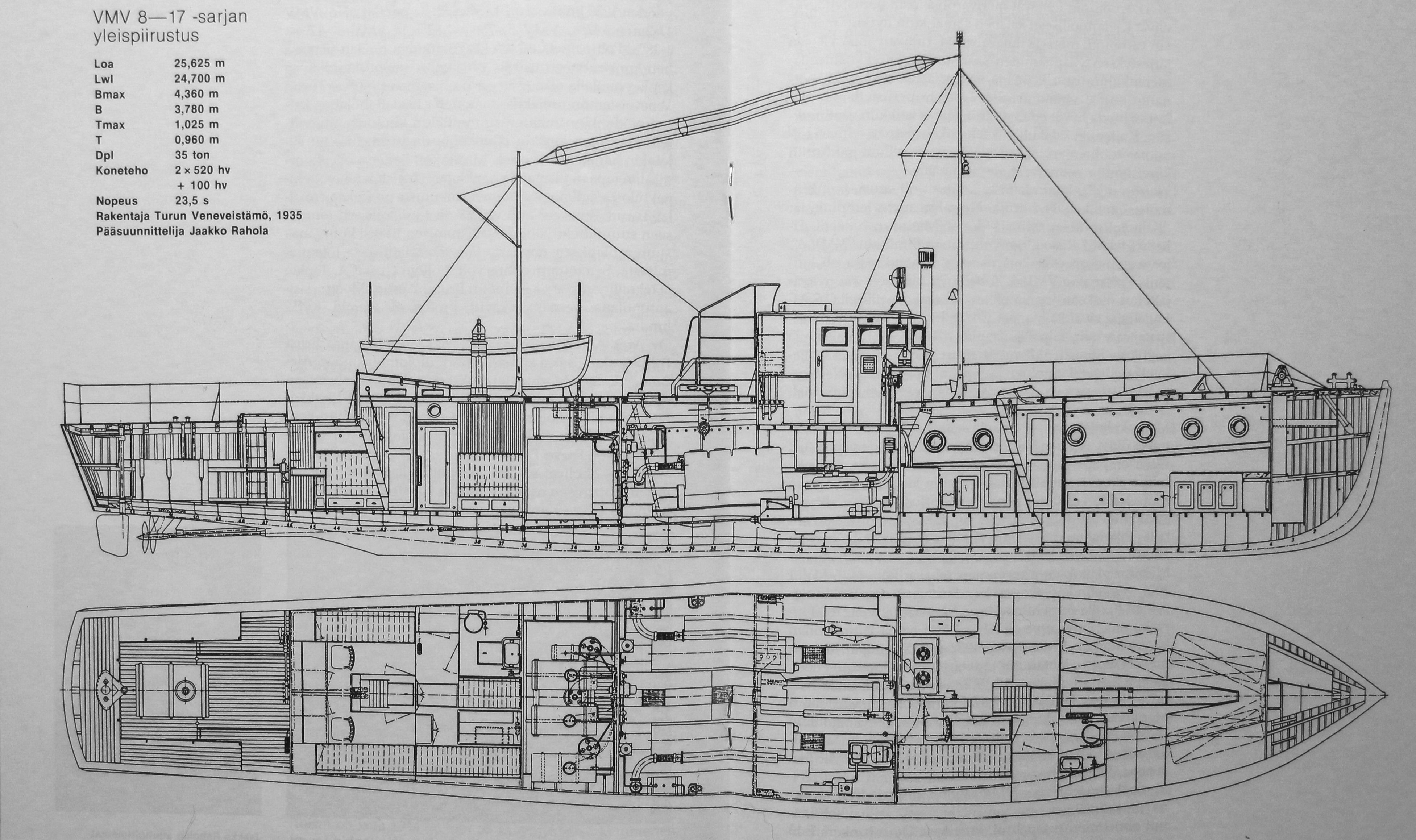 Vartiomoottorivene 8-17 -sarjan yleispiirustus, pääsuunnittelija Jaakko Rahola, rakentaja Turun Veneveistämö 1935